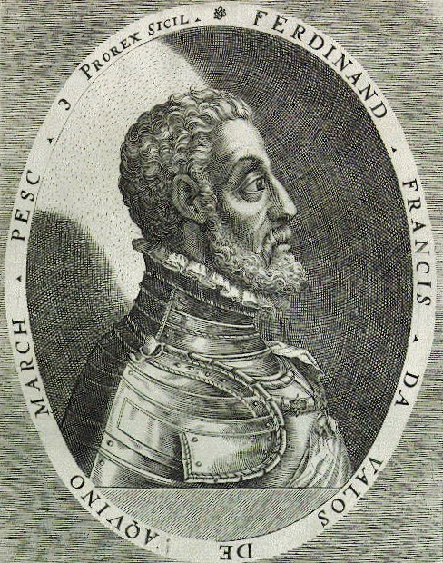 Fernando Francesco d'Avalos, copper engraving